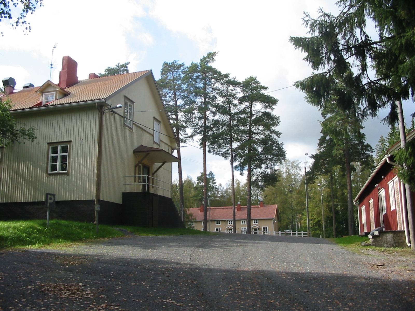 Levän koulu Ypäjällä.